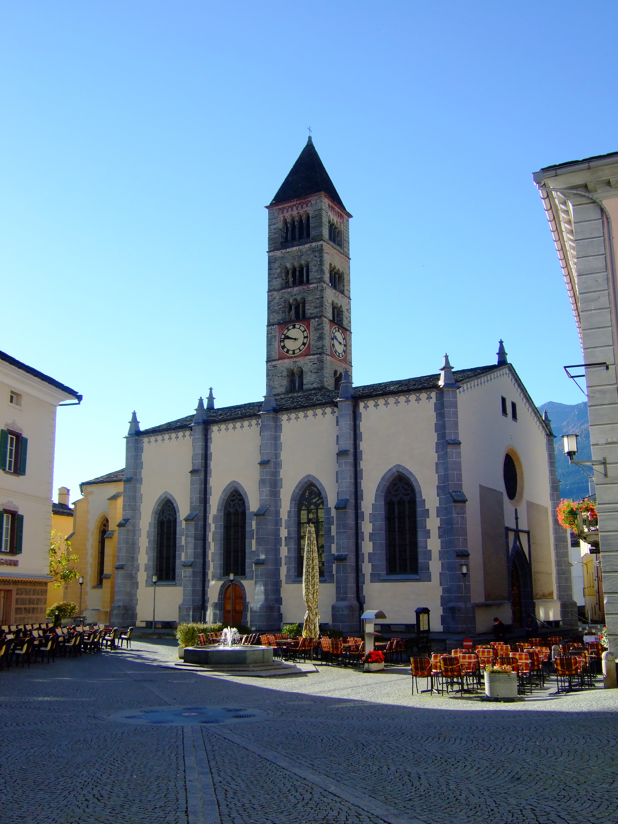 Piazza Communale in Poschiavo mit der Kirche San Vittore Mauro